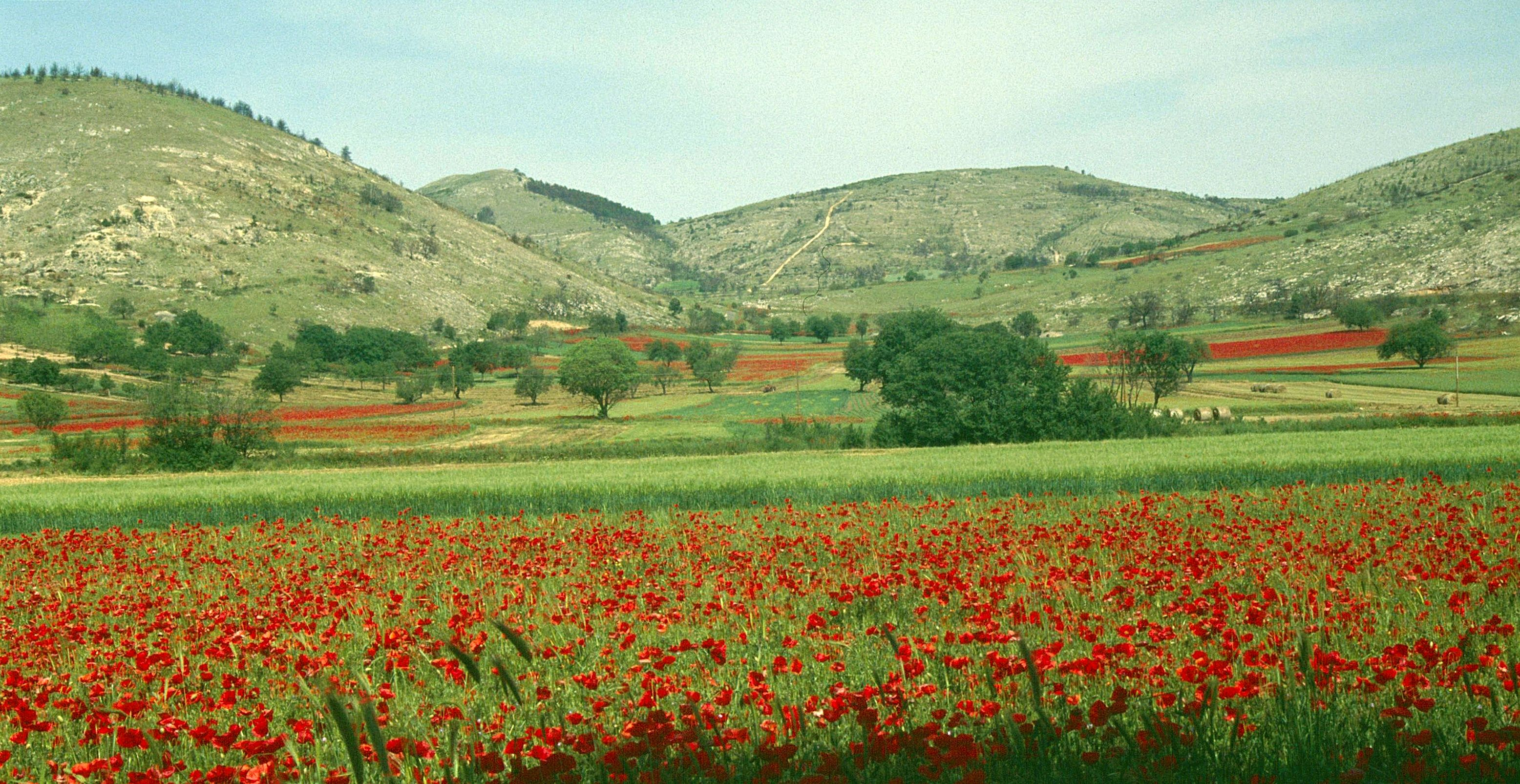 Wiesen und Felder bei Navelli/Abruzzen (Italien), teilweise mit zahlreich blühendem Mohn (Papaver sp.)